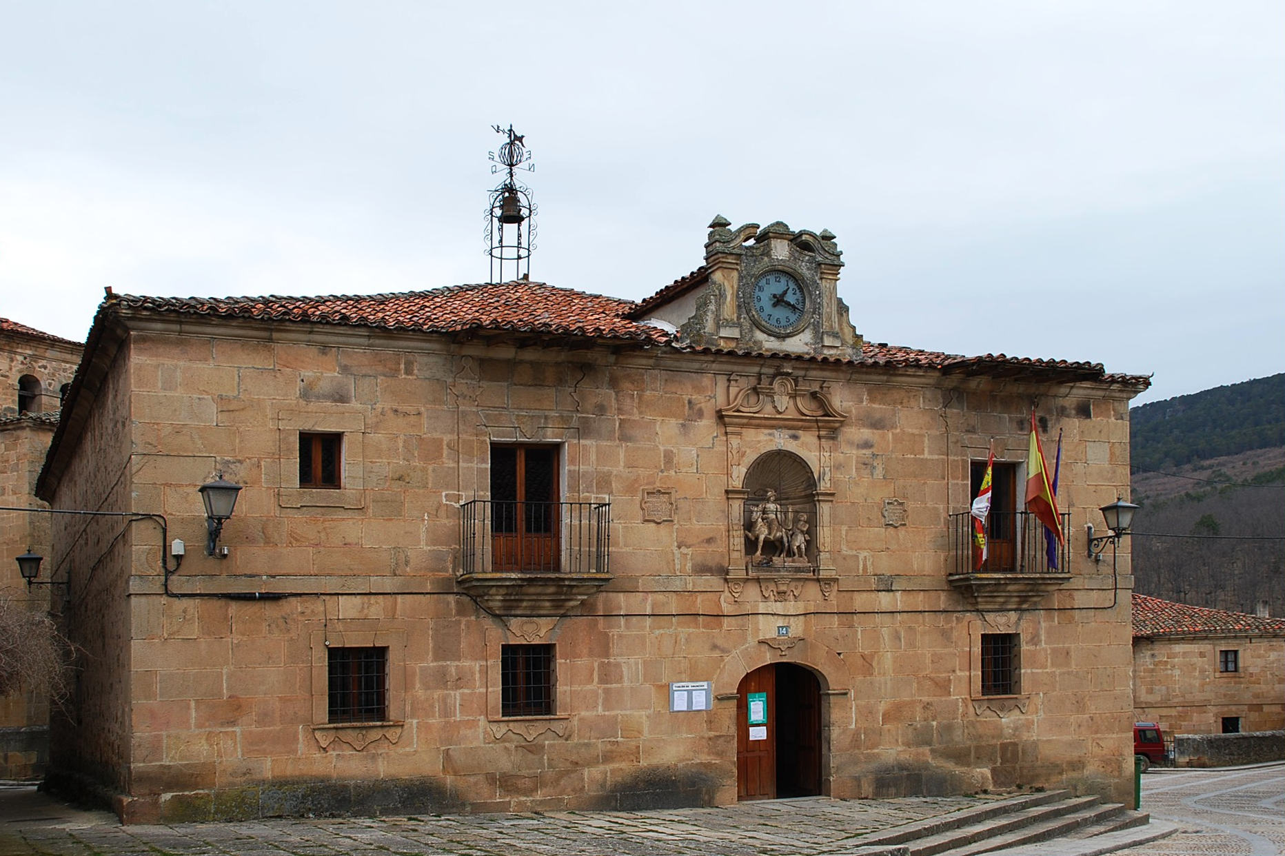 Ayuntamiento de Molinos de Duero (Soria).